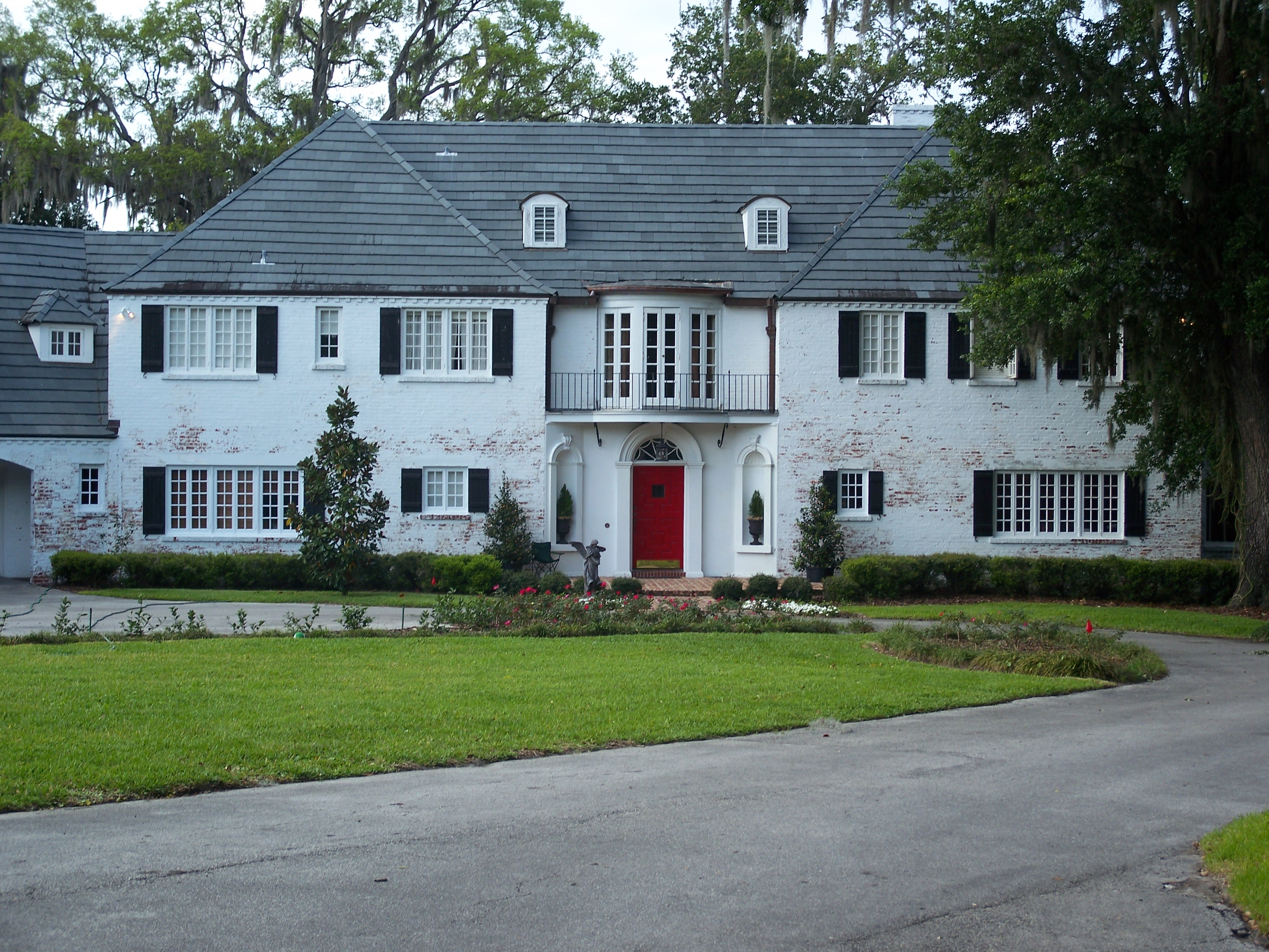 Huttig Estate, in Orlando, Florida